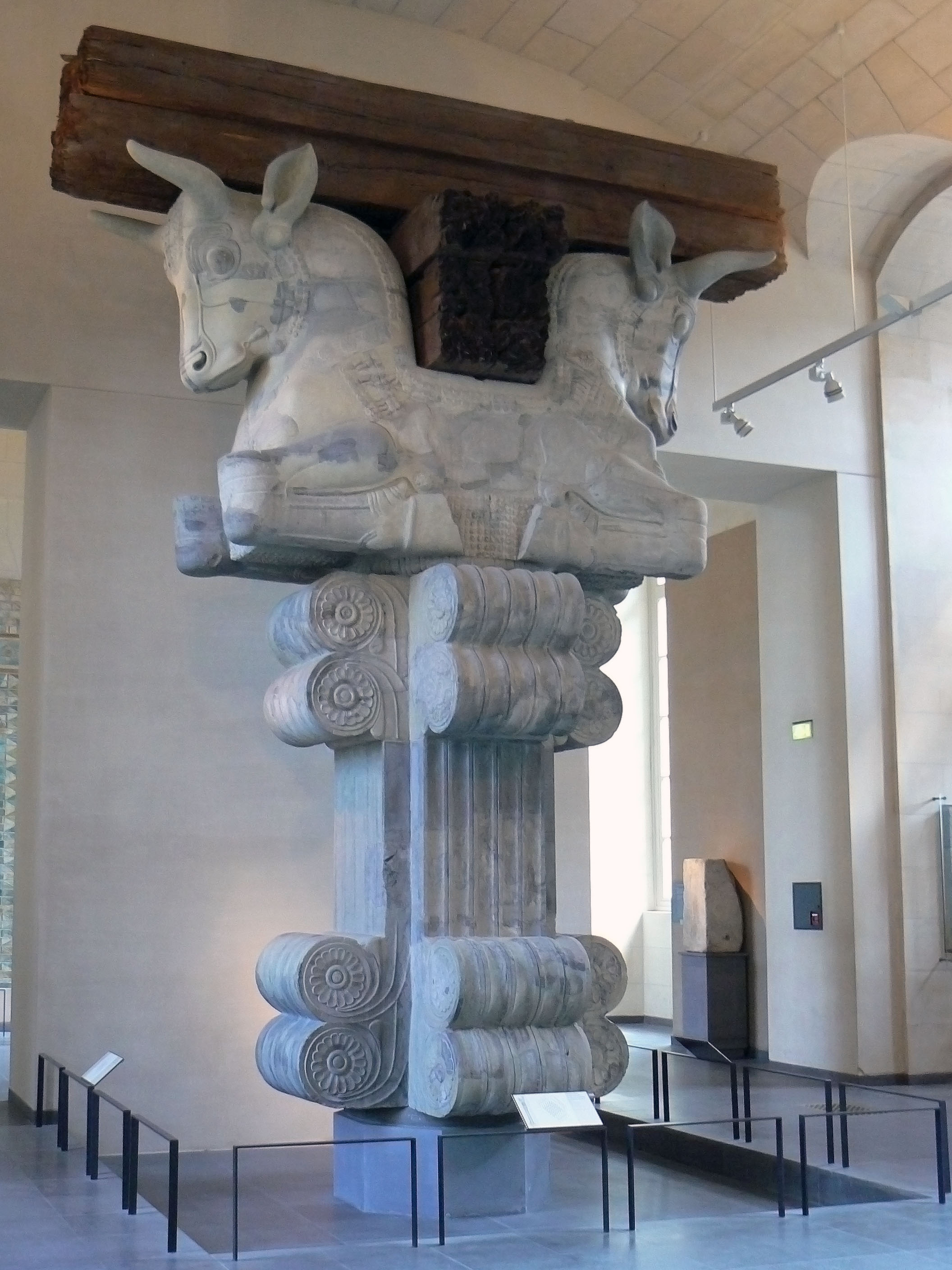 Iran's heritages in Musée du Louvre Persepolis Iran's heritages in Musée du Louvre